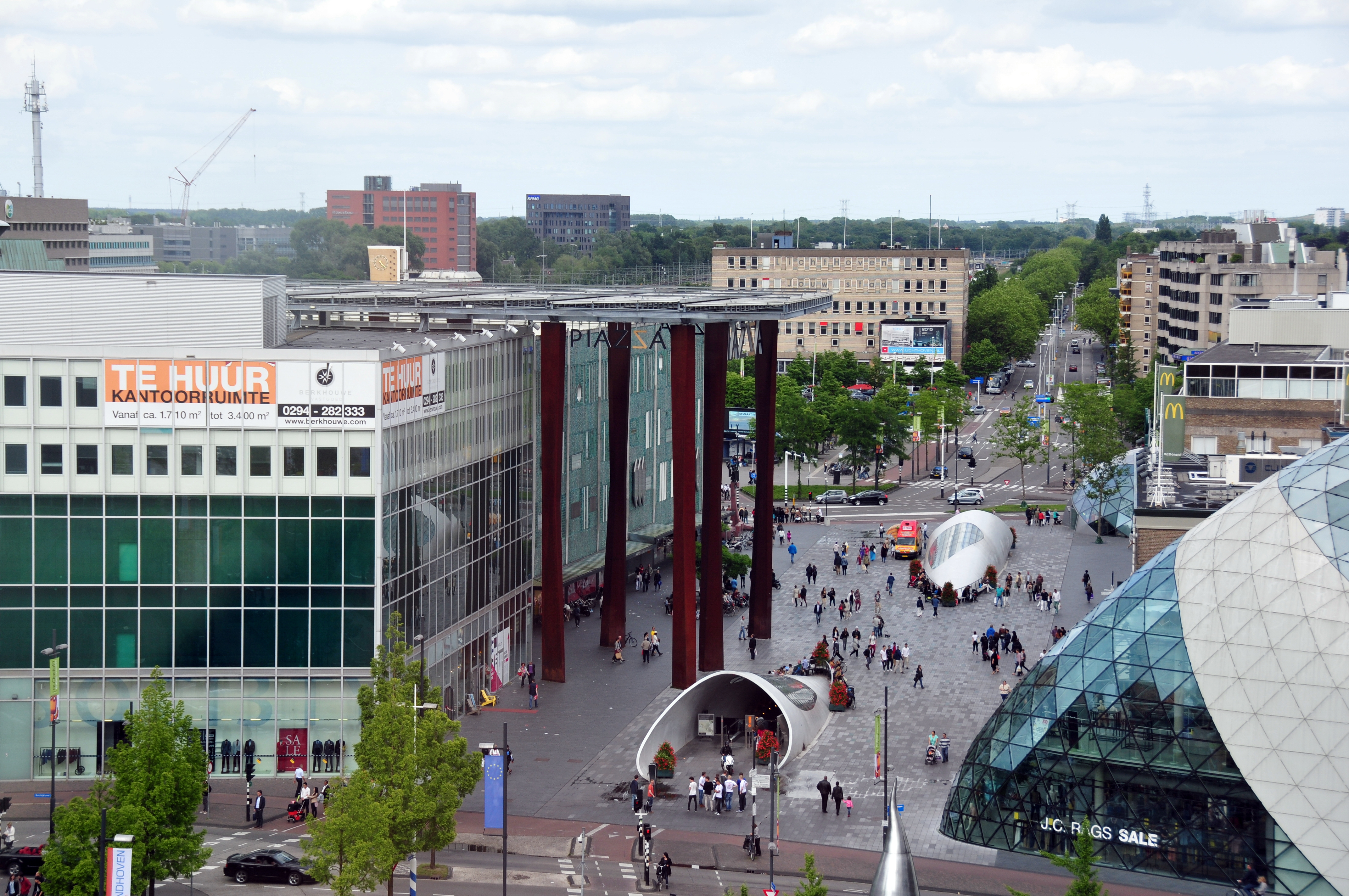 Eindhoven, Niederlande, 2013